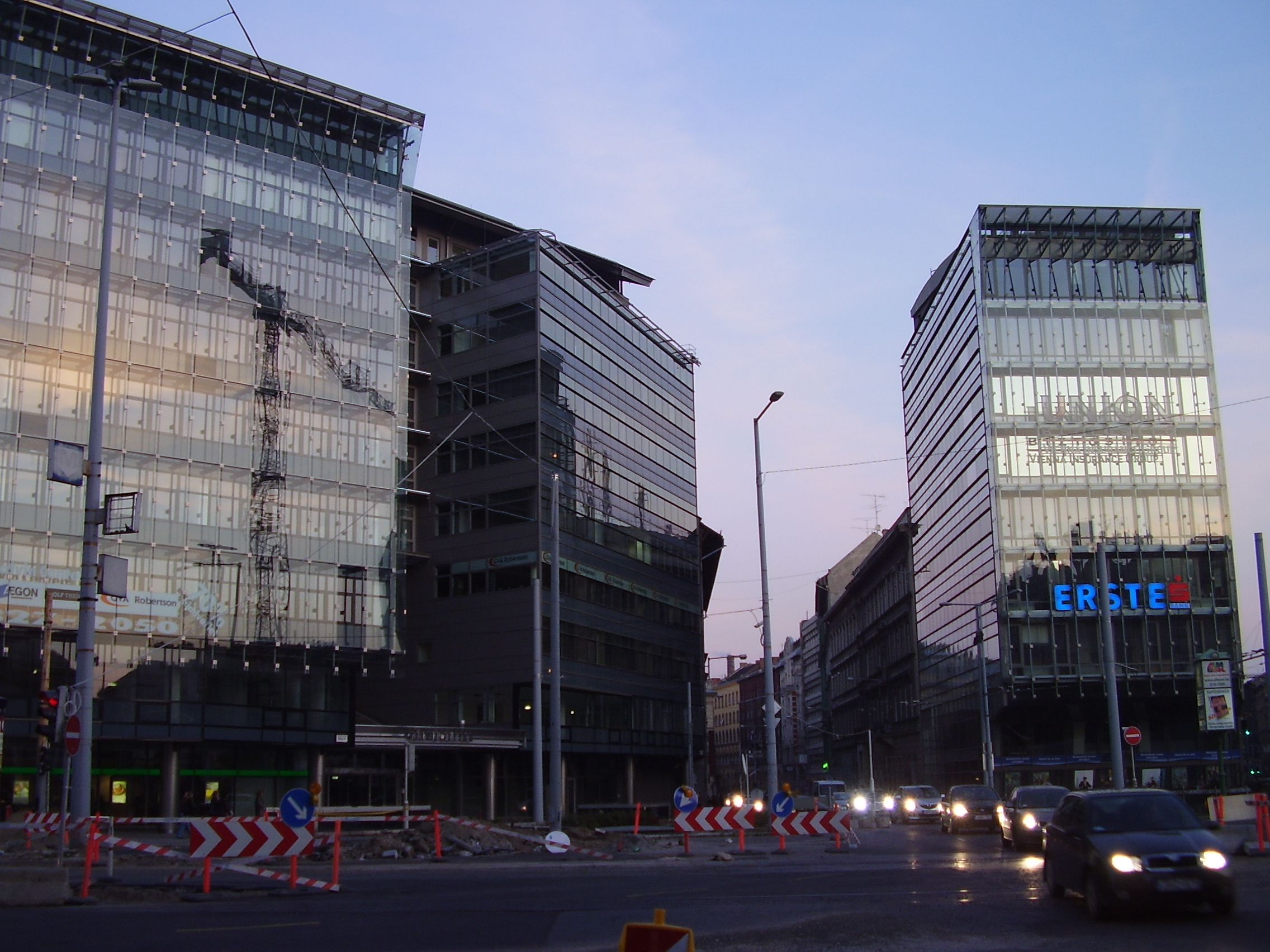 Modern street in Budapest